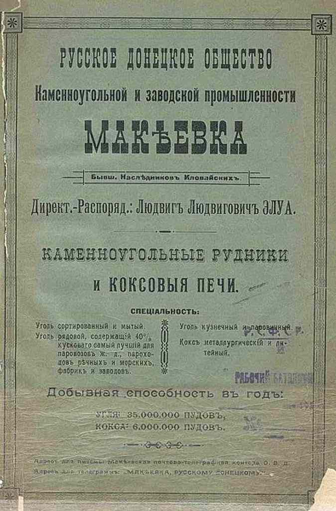 Рекламный листок Русского Донецкого общества каменноугольной и заводской промышленности. г. Макеевка, начало XX в.